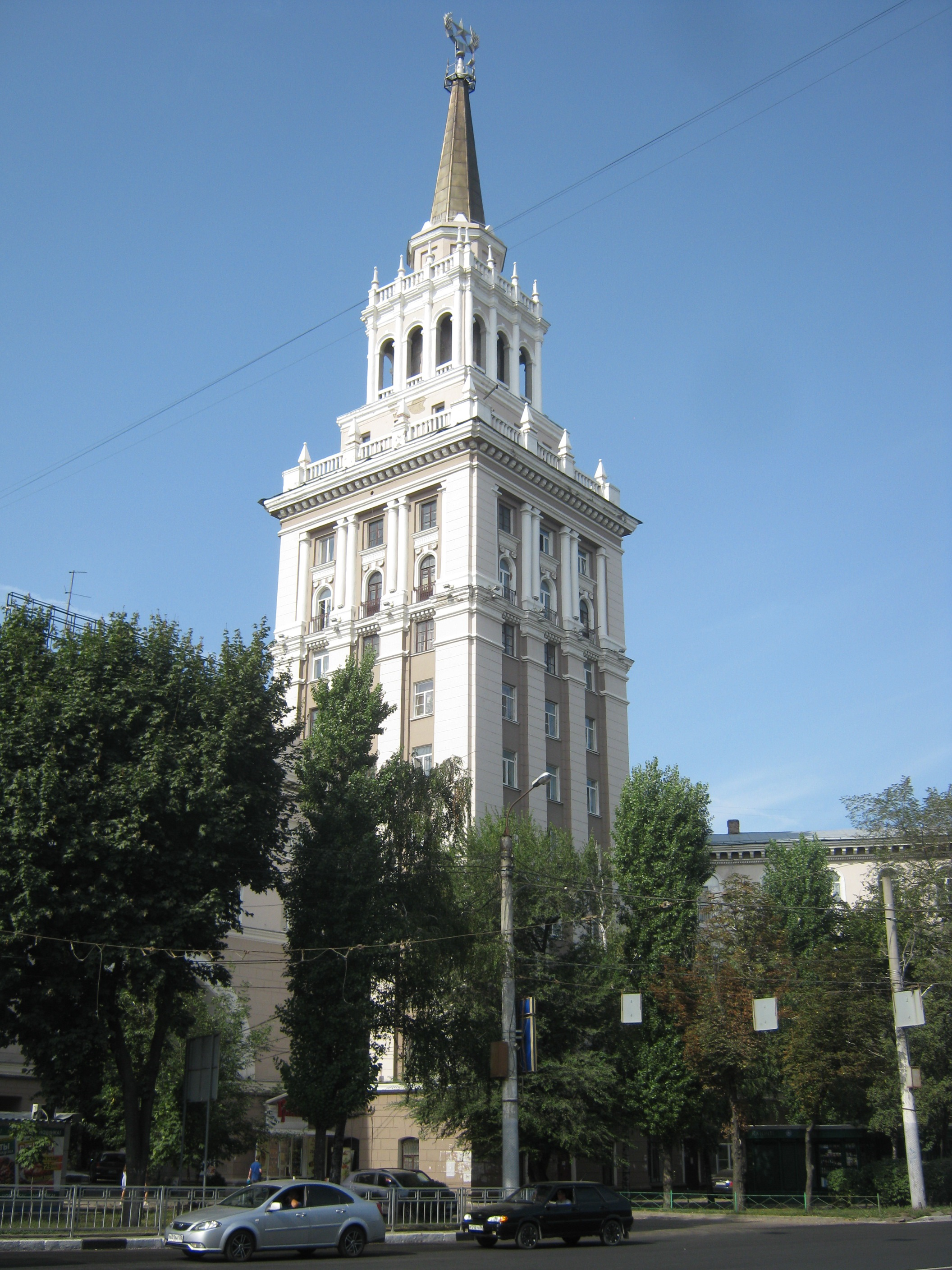 Дом у Девицкого выезда (Воронеж)